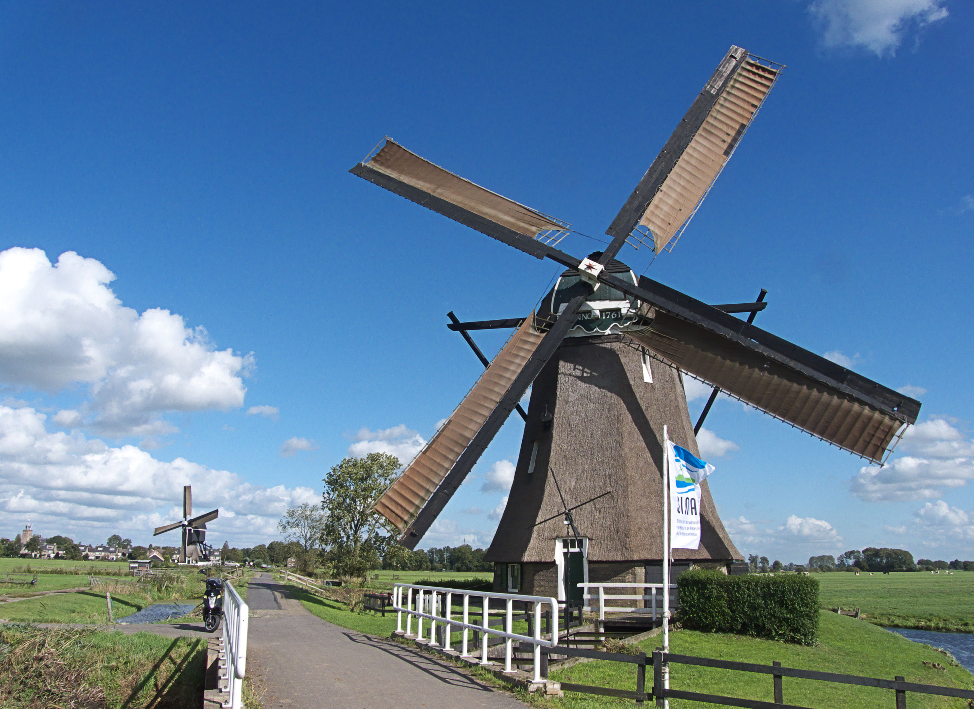 Achtkante Molen